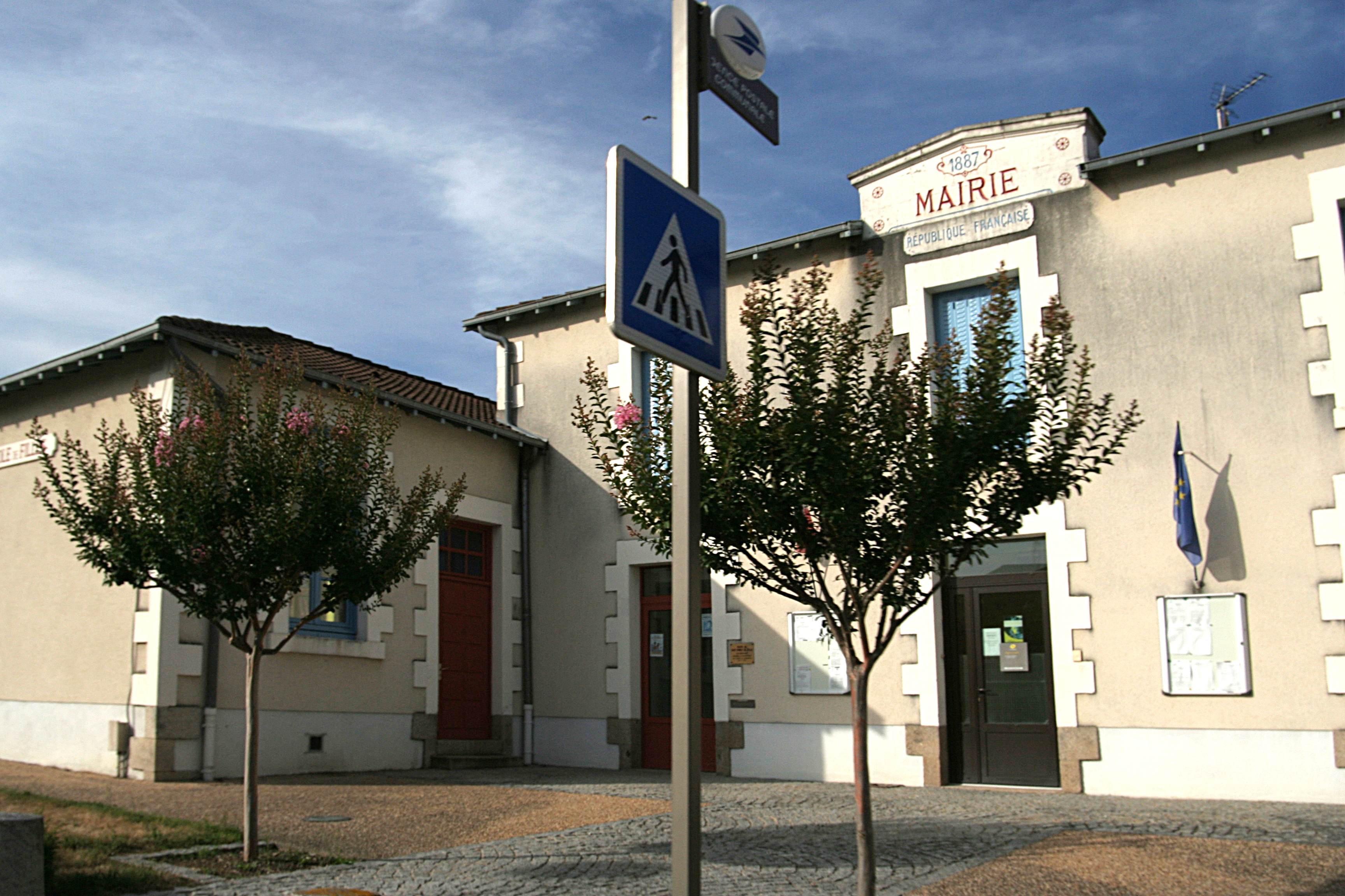 Mairie de Saint-Bonnet-de-Bellac.